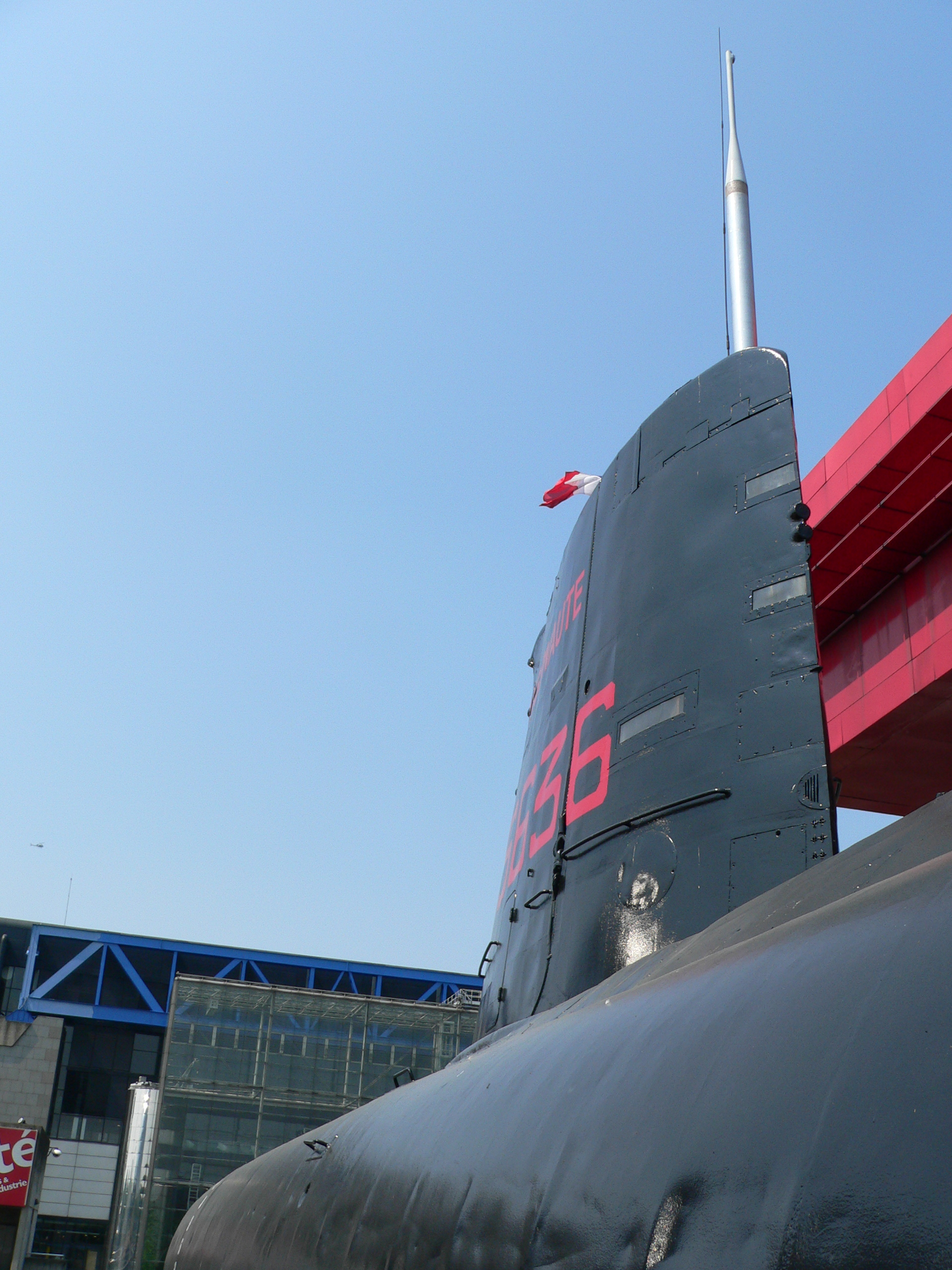 Argonaute